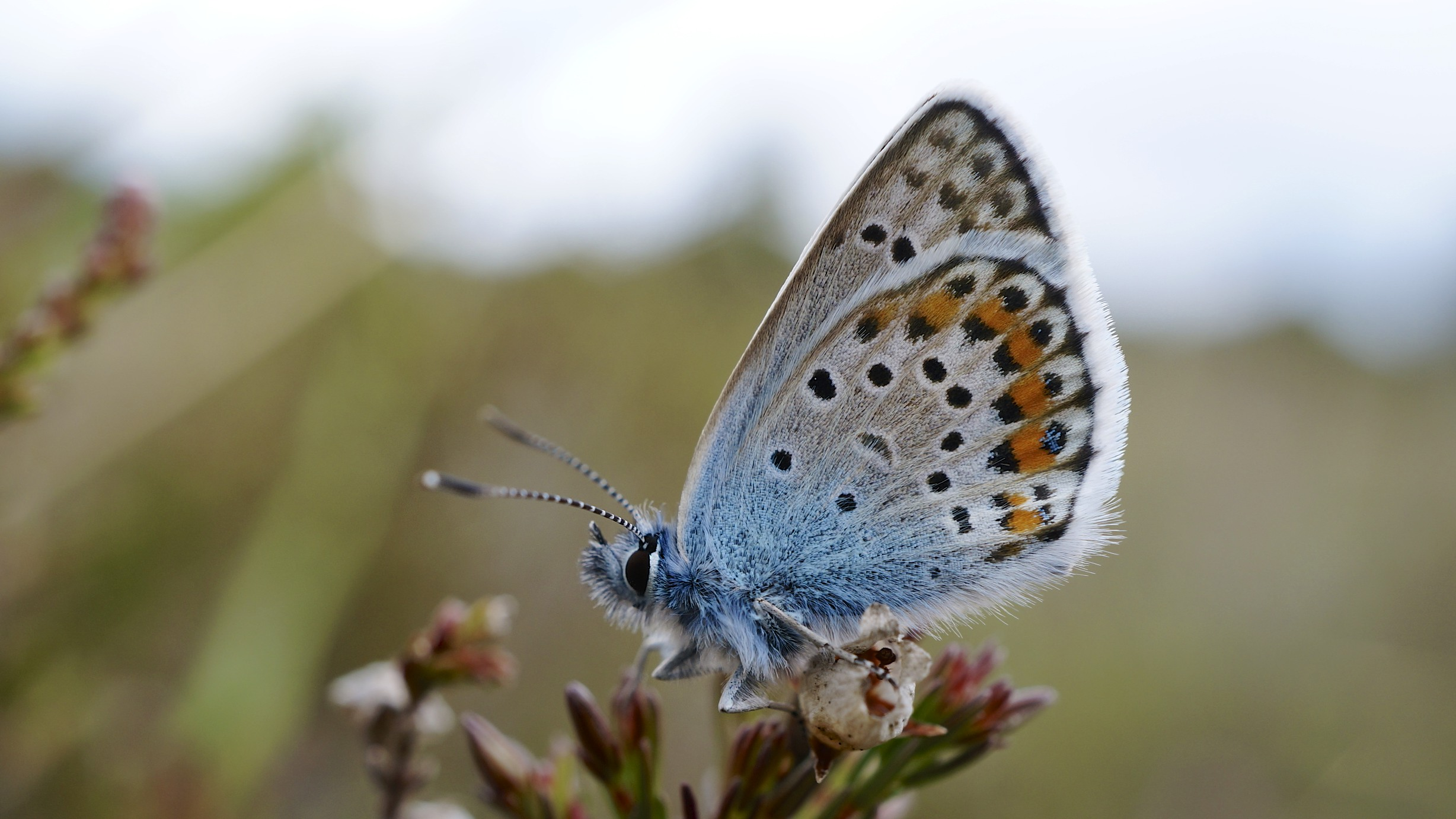 A male Silver Studded Blue butterfly at Morden Bog, Dorset.